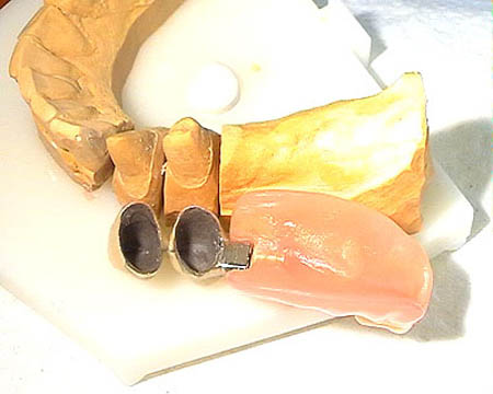 Freiendprothese, Zahnprothese